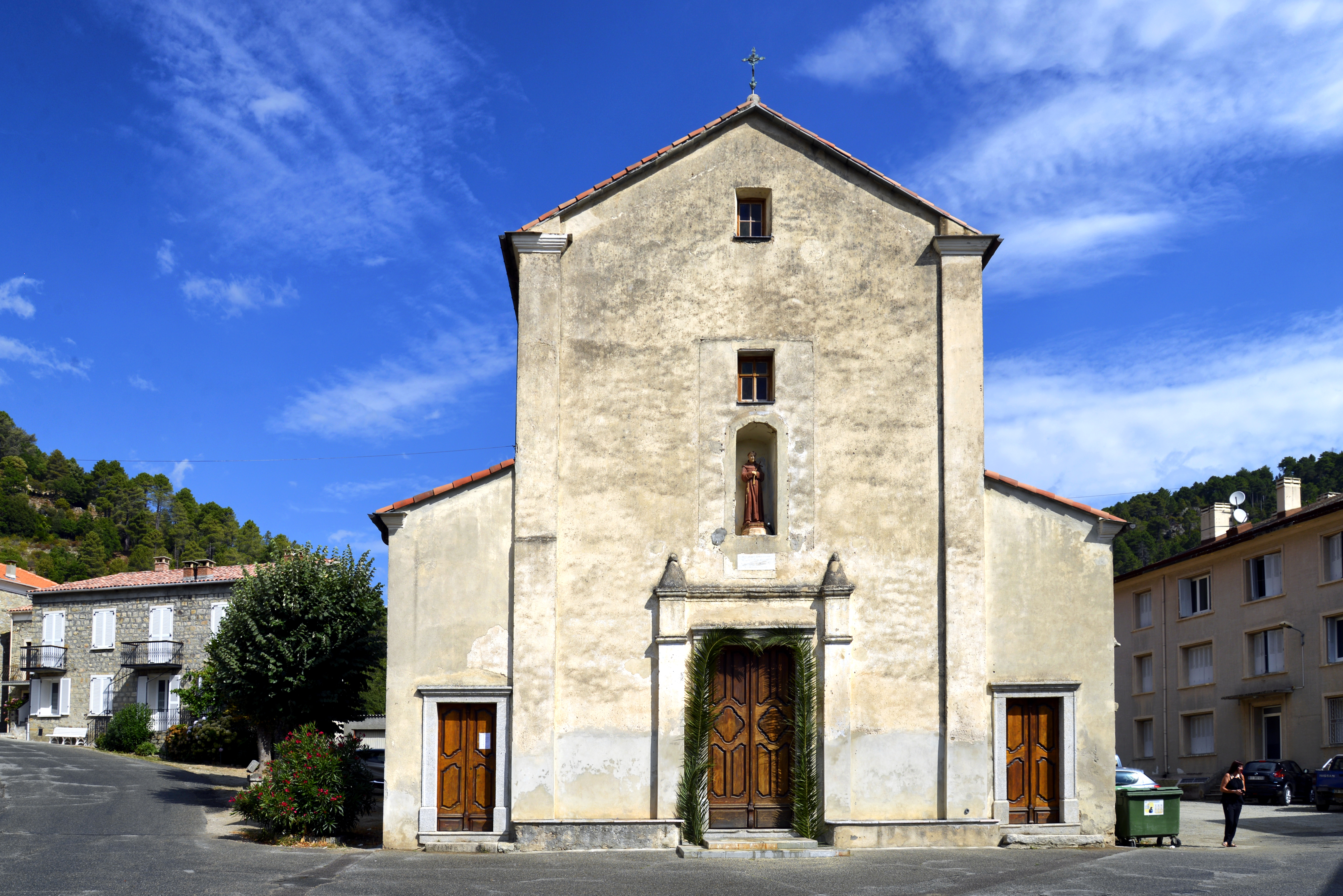 Ghisoni, Fiumorbo (Haute-Corse) - L'église paroissiale San Francheschinu, du nom du vénérable Franceschinu Mucchielli originaire de Ghisoni